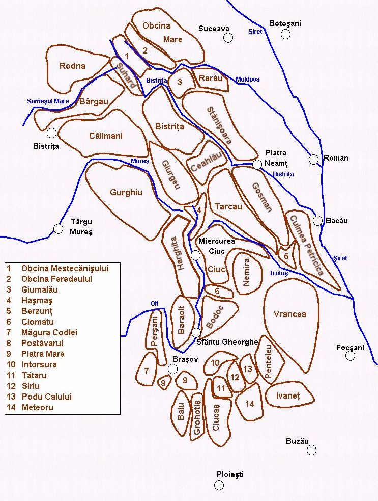 Gliederung der Ostkarpaten in Rumänien (Eastern Carpathians in Romania)